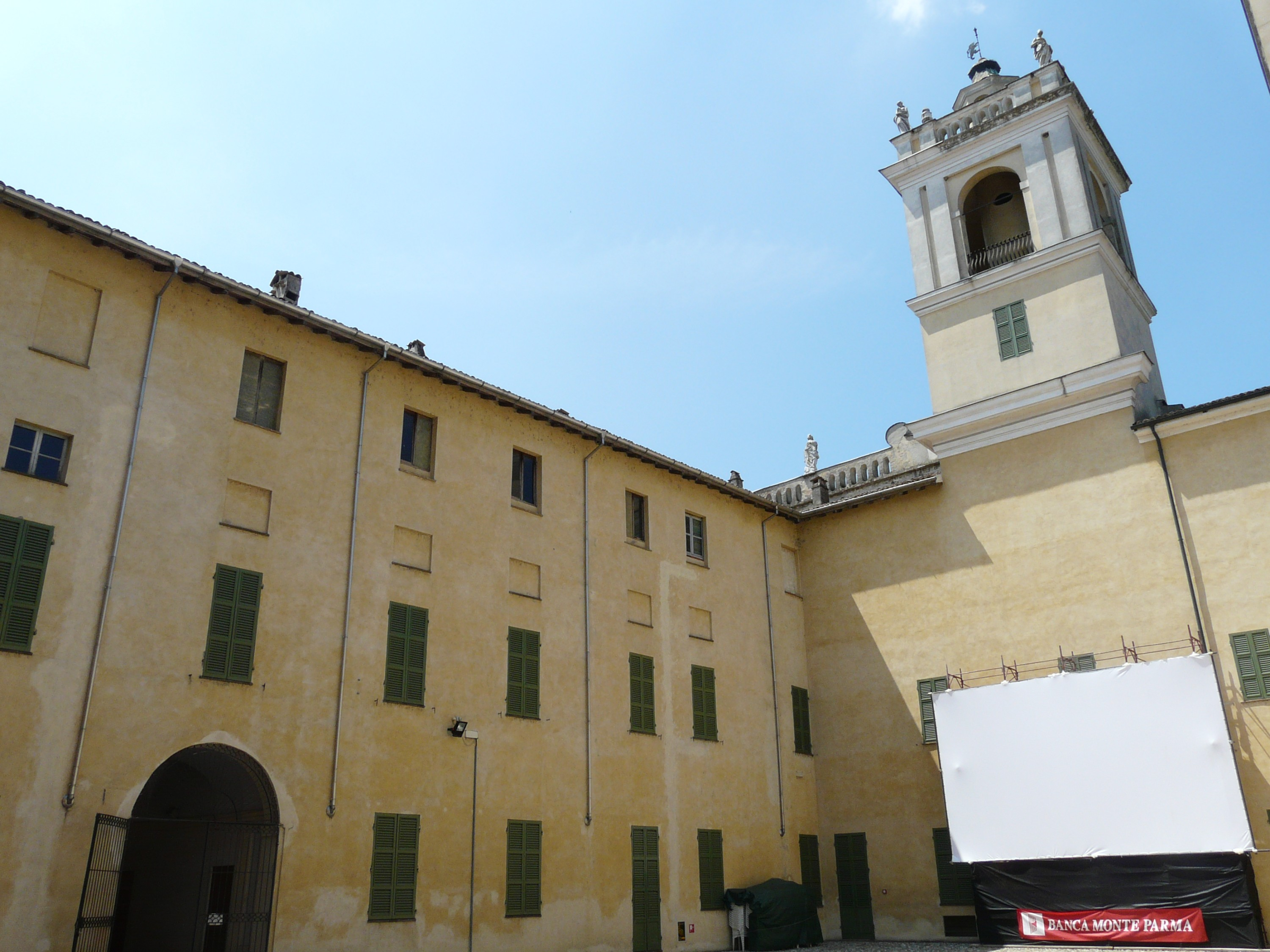 Immagini della Reggia di Colorno, Emilia-Romagna, Italia